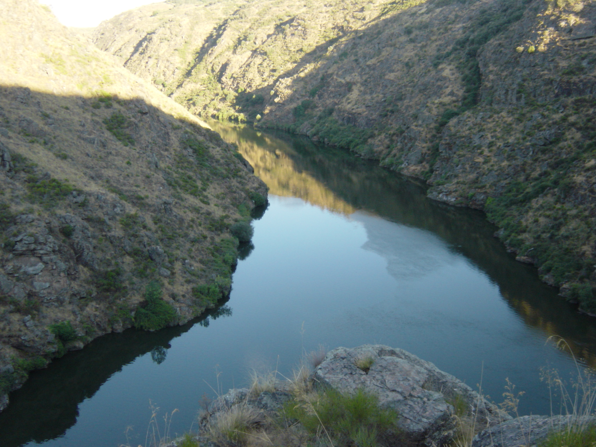 Arribes del Duero entre los municipios zamoranos de Pino del Oro y Villadepera.